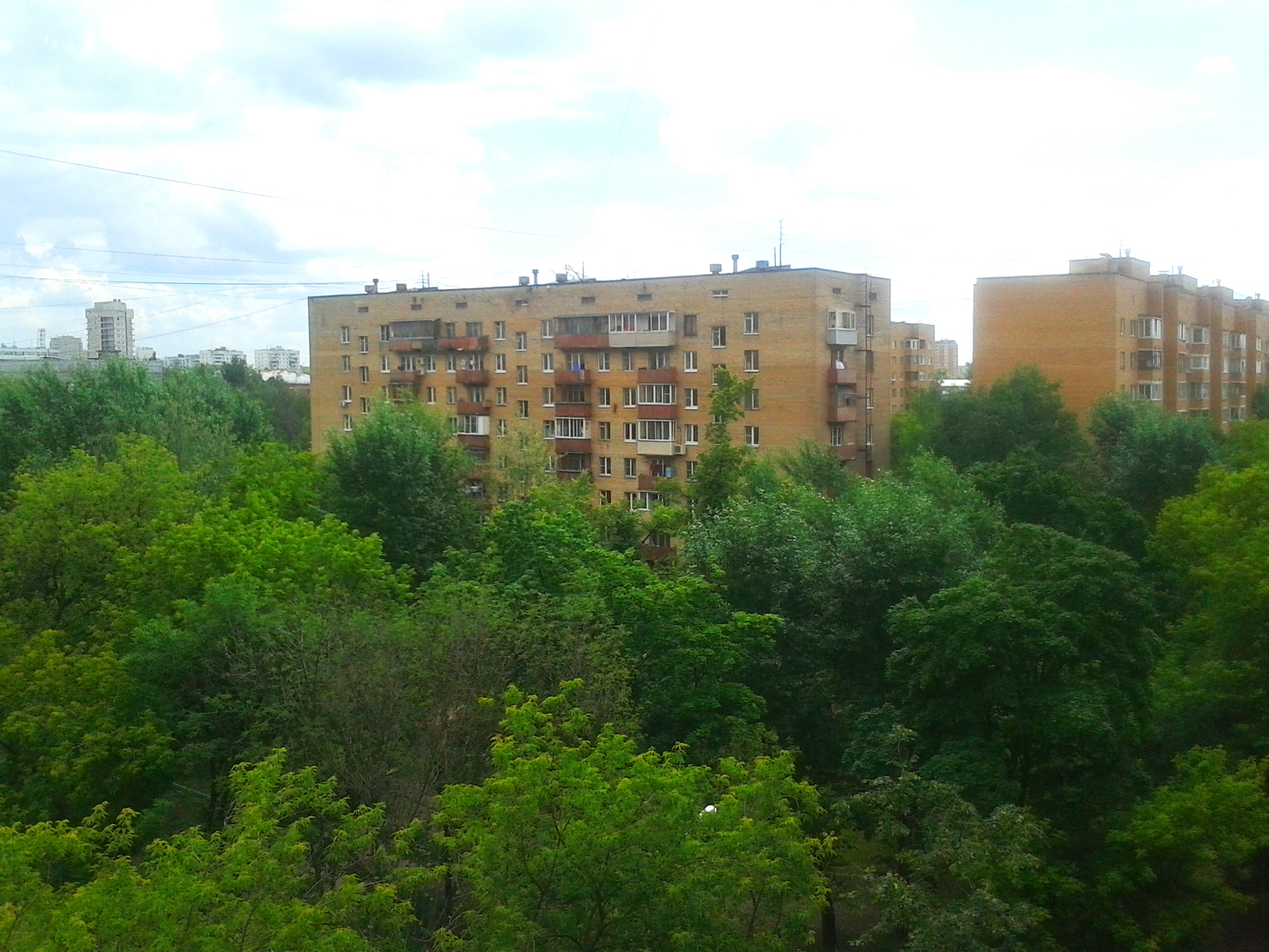 Двор на 3-ей Владимирской улице. Москва.